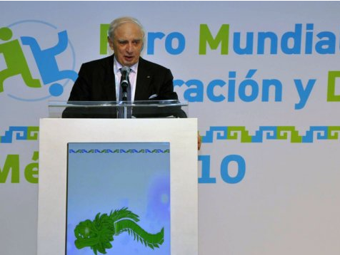 Fotografía tomada al Representante Especial del Secretario General para la Migración, Sr. Peter Sutherland durante su participación en la IV reunión del Foro Mundial sobre Migración y Desarrollo, Puerto Vallarta, Jalisco, noviembre de 2010